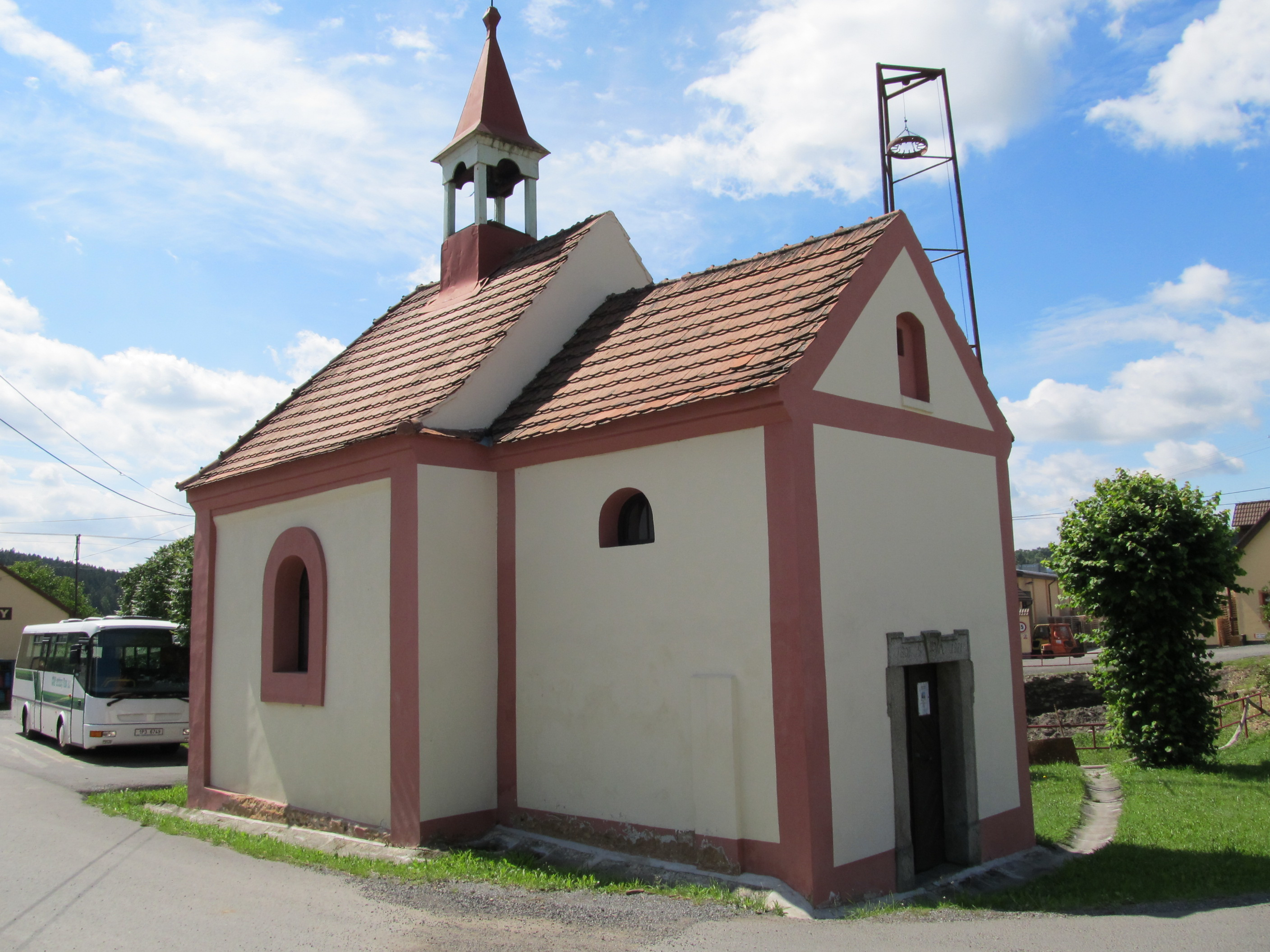 Kladrubce - kaple sv. Anny